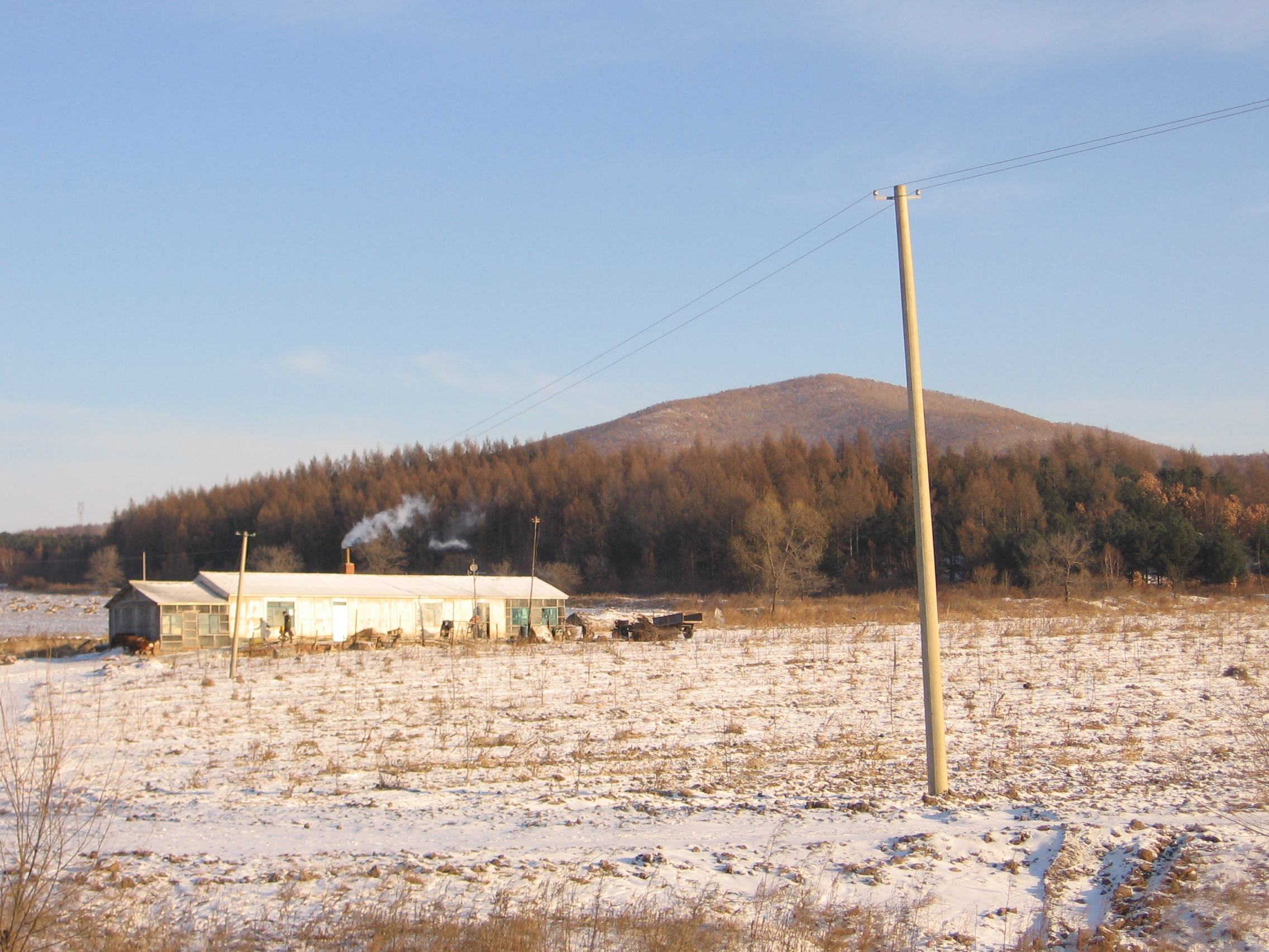 Paysage Naturel